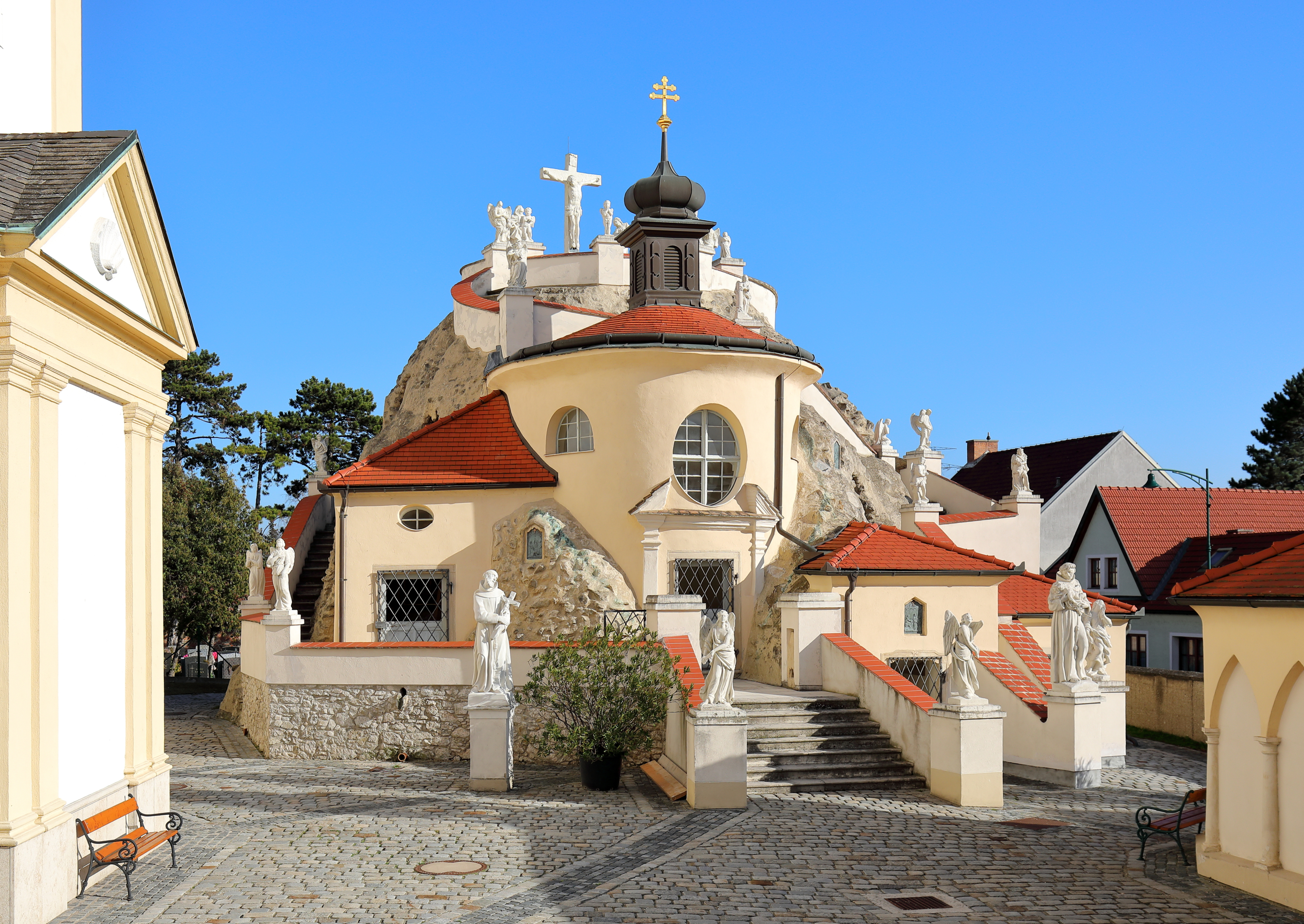 Westansicht des Kalvarienberges in der niederösterreichischen Gemeinde Maria-Lanzendorf sowie links ein Teil der Pfarr- und Wallfahrtskirche und rechts ein Teil der Heilig-Grab-Kapelle, die zum Kriegerdenkmal umgestaltet wurde.Errichtet wurde die leicht begehbare Anlage zur Darstellung der Leidensszenen Jesu durch den Franziskaner-Laienbruder Felix Niering und Helfern von 1699 bis 1701. Im Jahr 1709 wurde die Nachbildung der HI. Stiege, über die Christus zum Palast des Pilatus hinauf geführt worden war, hinzugefügt.